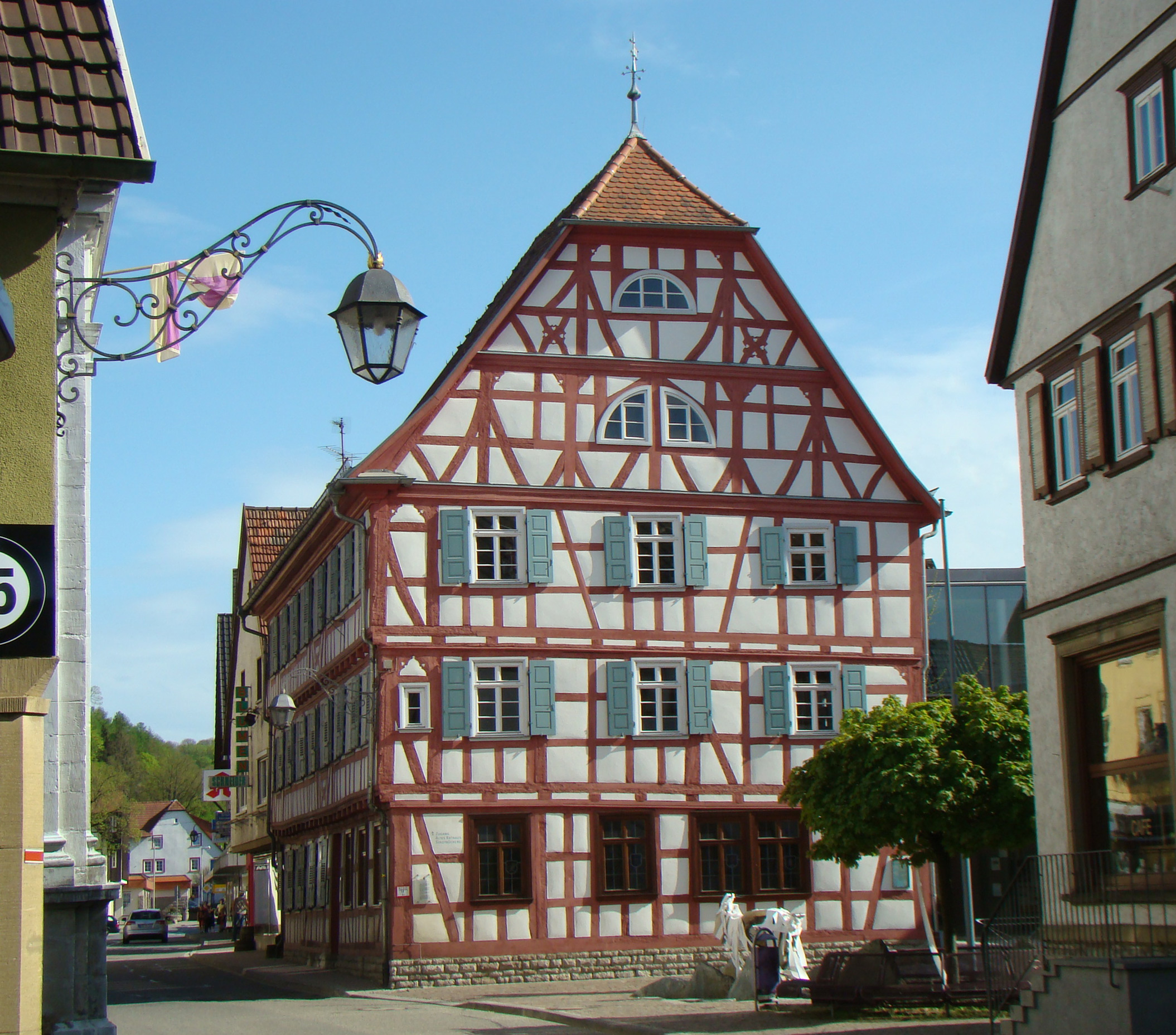 Altes Rathaus in Adelsheim